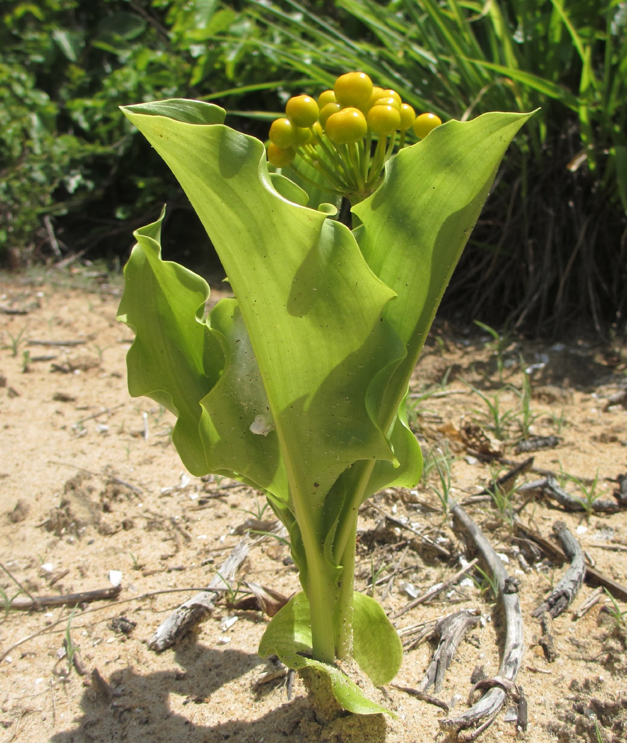 Scadoxus multiflorus in fruit